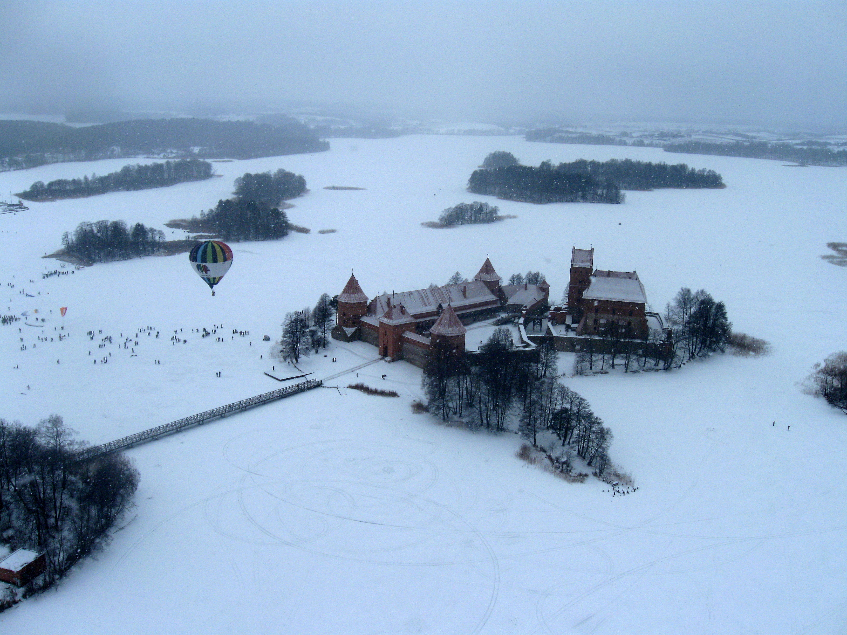 Trakų oro šventė. Fotografuota 2009-02-16